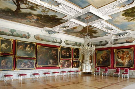 Schloss Eggenberg, Galeriezimmer